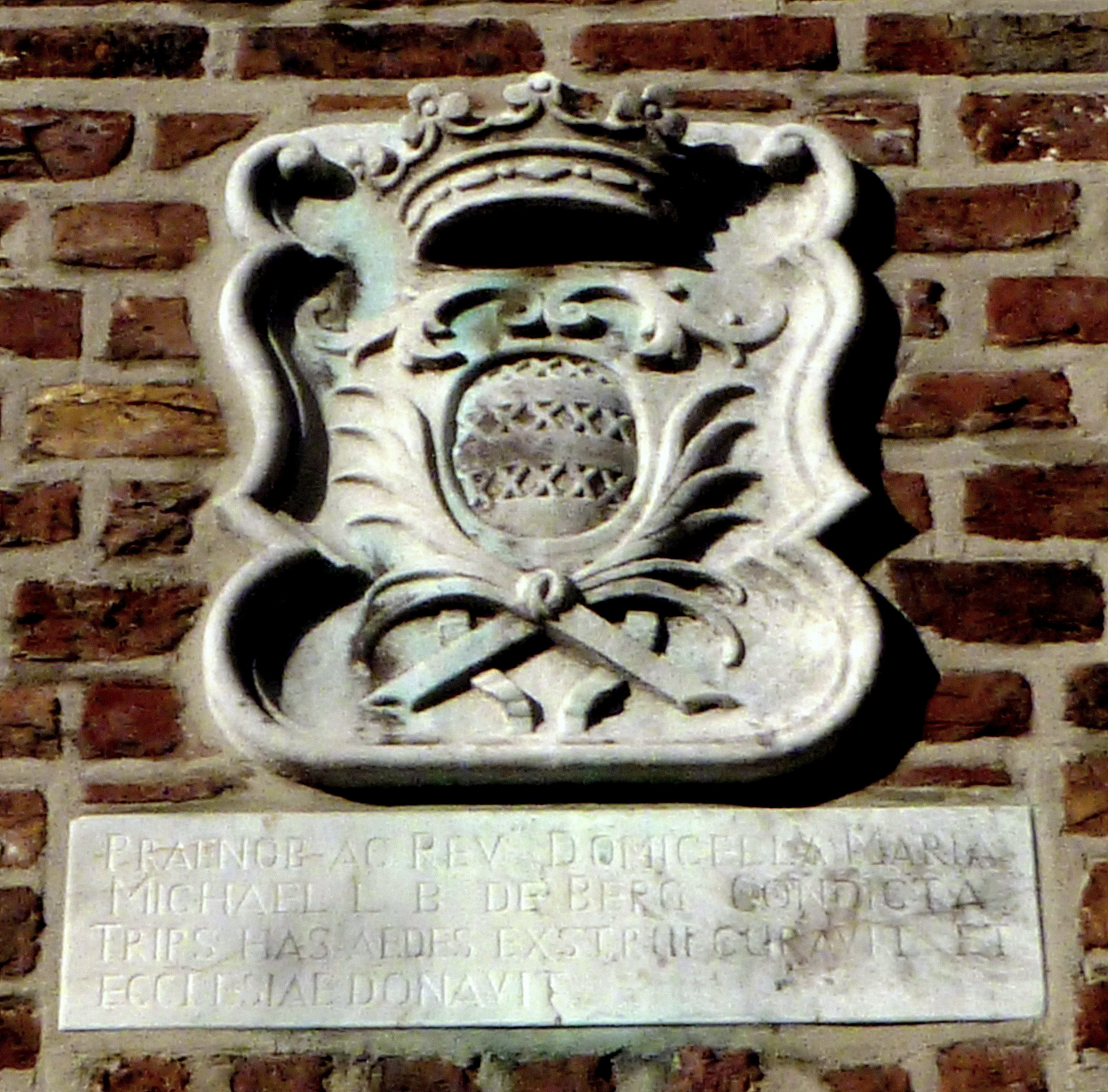 Wappen der Äbtissin von Burtscheid Maria Berghe, gen. Trips